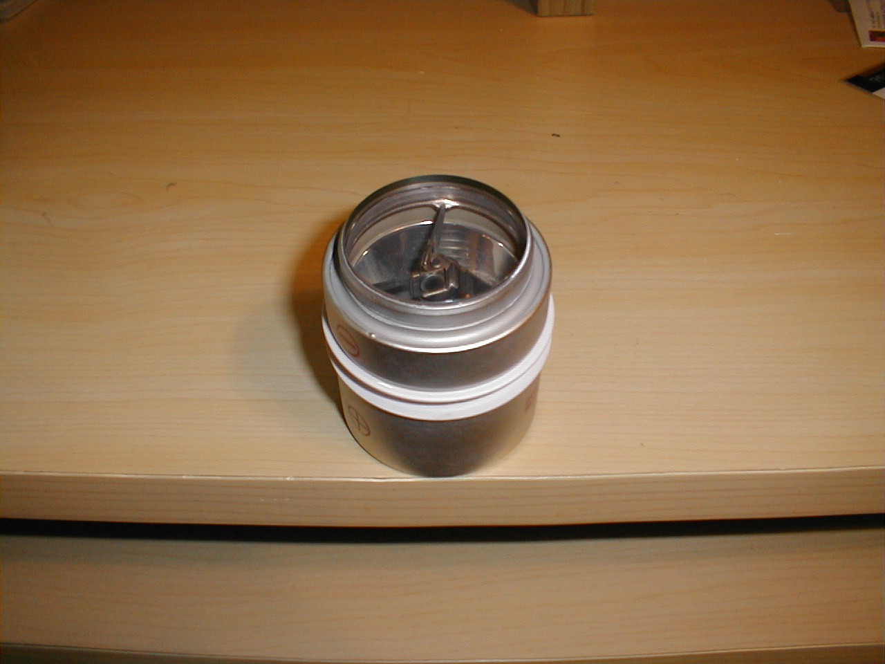 2 kW xenon lamba bir video projektöründen Cermax. Soğutucular ve bir çift de bu lamba, güç kaynağı için bir çift çevresinde iki metal grupları, kenetli.